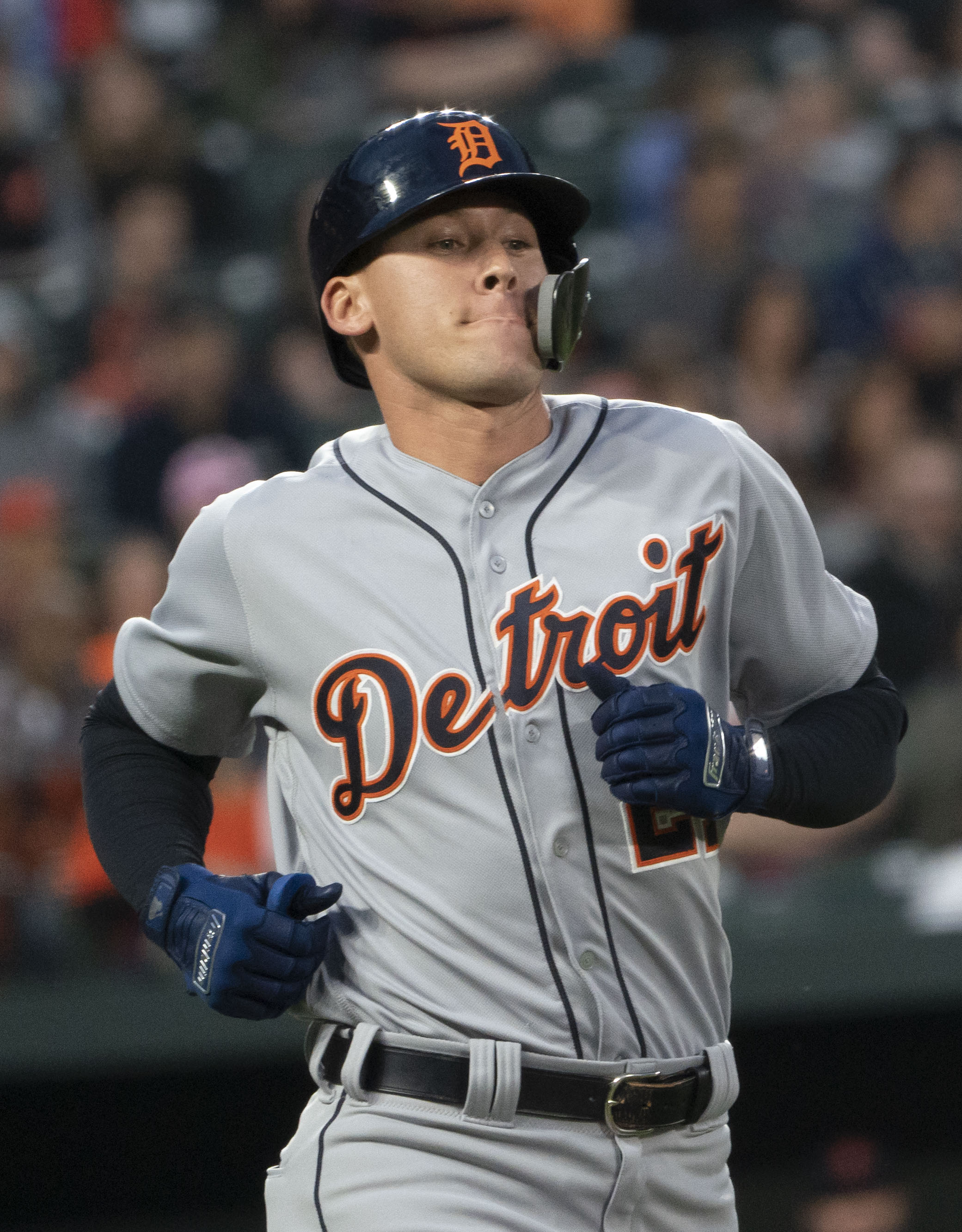 Tigers at Orioles 4/28/18